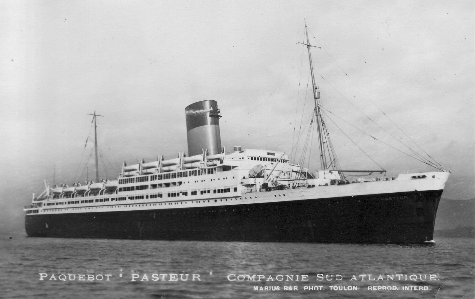 Le paquebot français SS Pasteur. Lancement à Saint-Nazaire